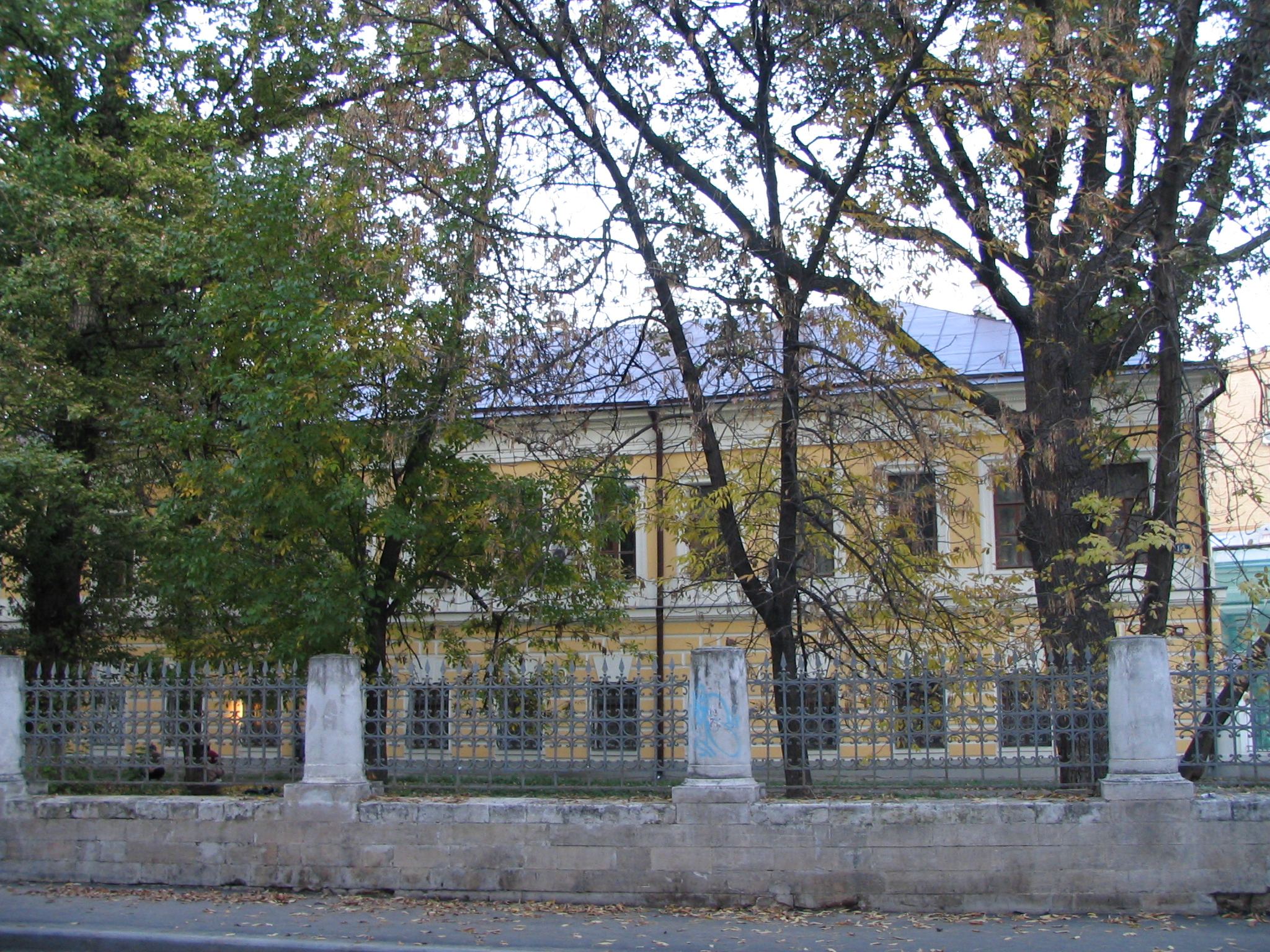 Miliutinsky, 14